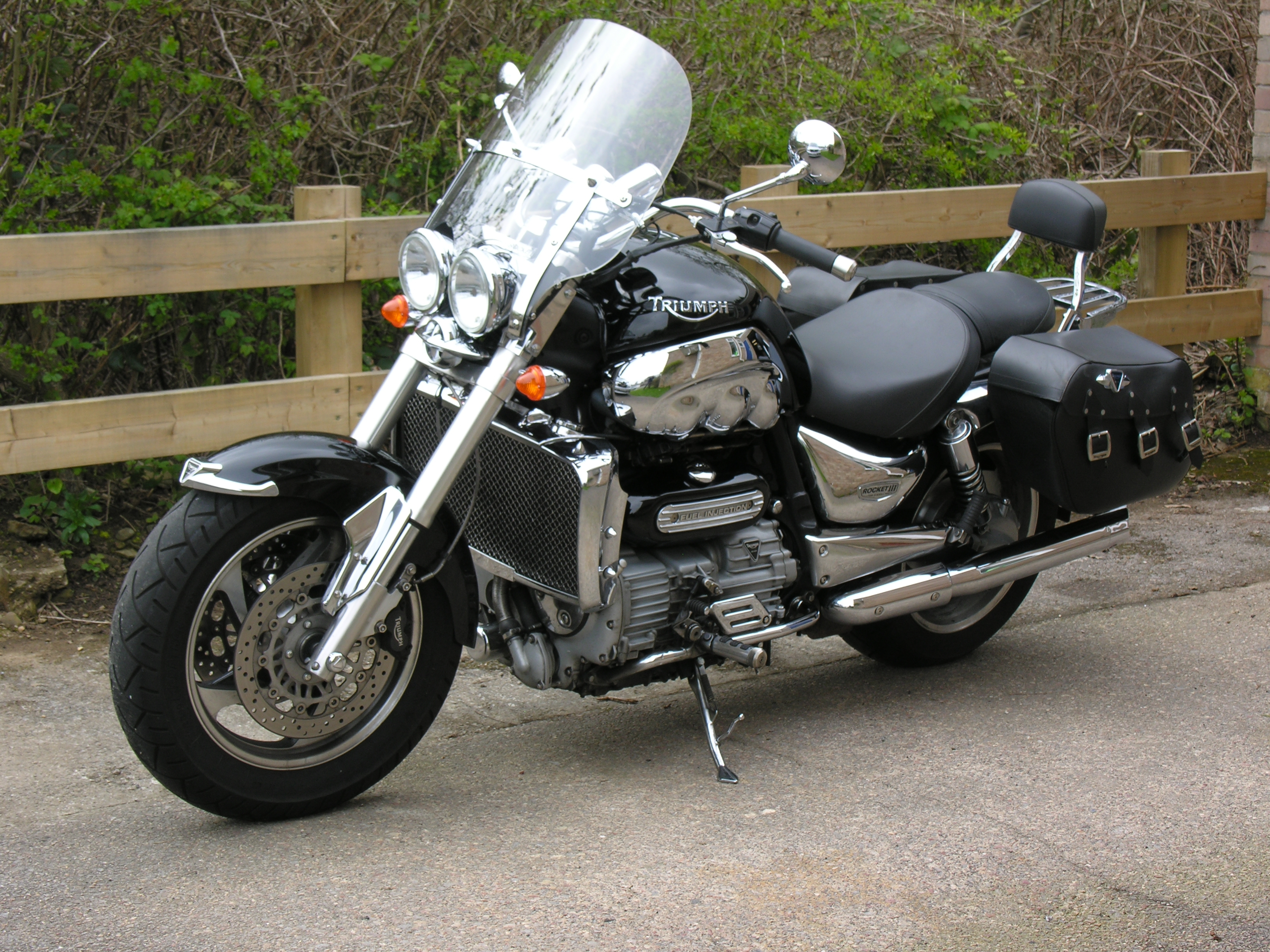 Triumph Rocket III